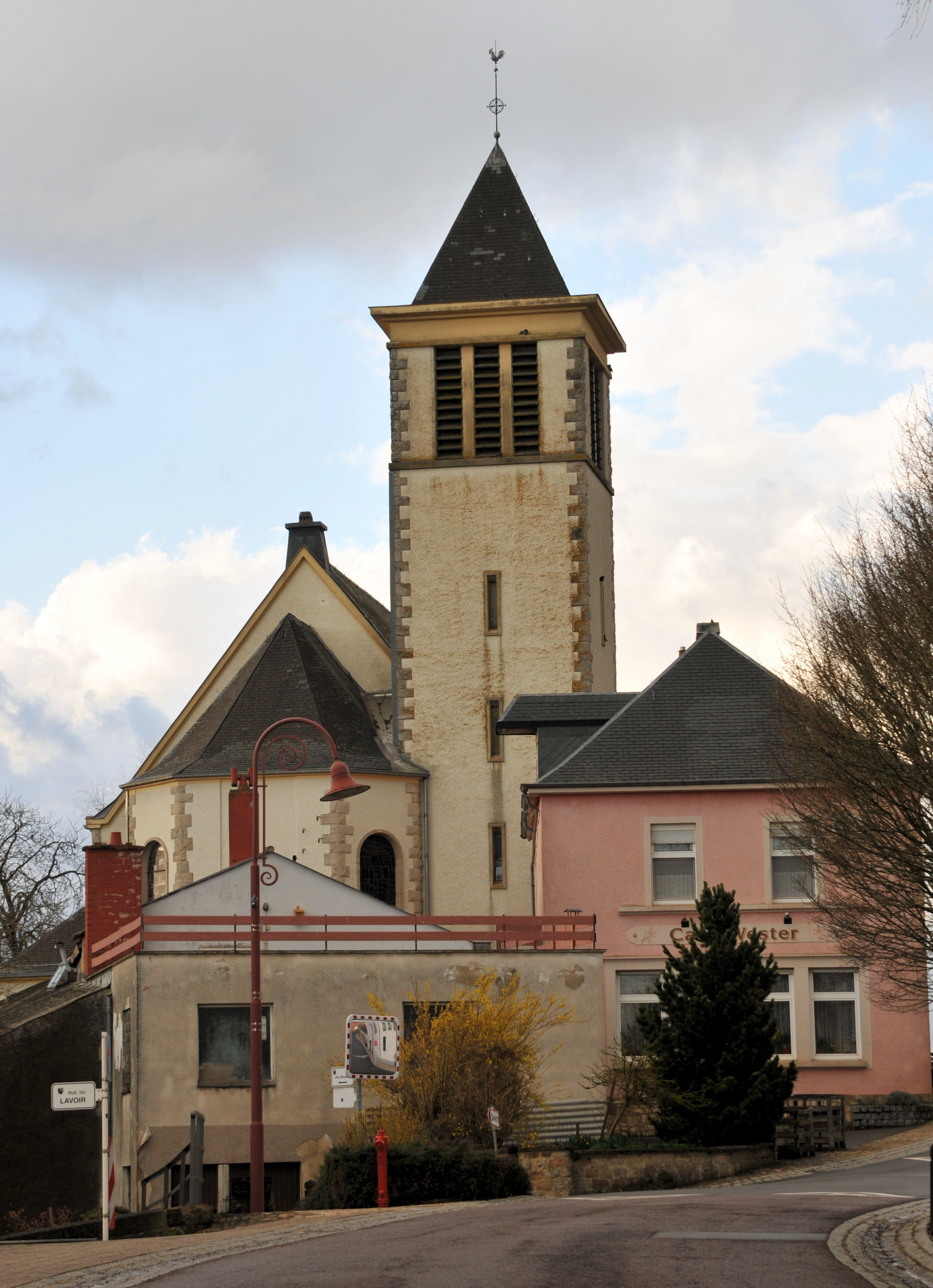 D'Parkierch vu Reckeng op der Mess.